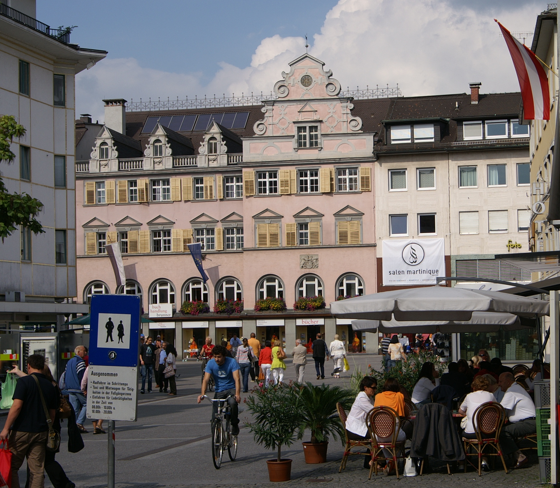 aus dem DEHIO Vorarlberg 1983: Rathausstrasse Nr.2 Johann Stefan Wachter, 1889, Umbau Willibald Braun, 1923. 2gliedrige Fassade mit Satteldach und Balustrade bezw. Volutengiebel zum Leutbühel gerichtet, 3geschossig, Fensterarkaden im Erdgeschoss, späthistoristisch, Fassadendekor durch Beschlagwerk in der Giebelzone. In Bregenz. Quelle: Dehio Vorarlberg